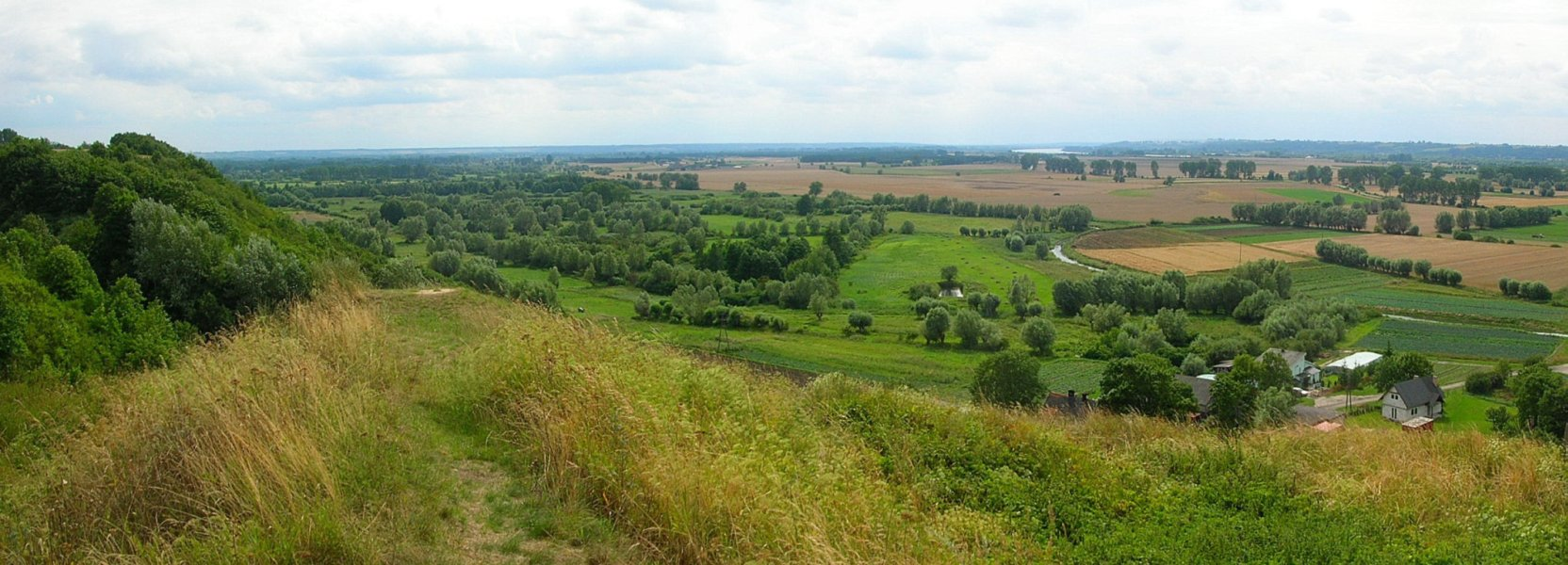 Widok ze wschodniego zbocza Doliny Dolnej Wisły w okolicy Starogrodu i Góry św. Wawrzyńca, powiat chełmiński